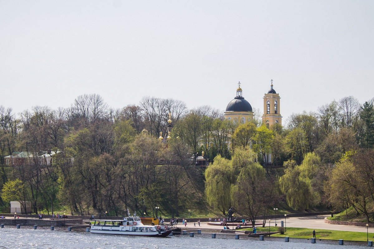 Палацава-паркавы комплекс ў Гомелі. Краявід